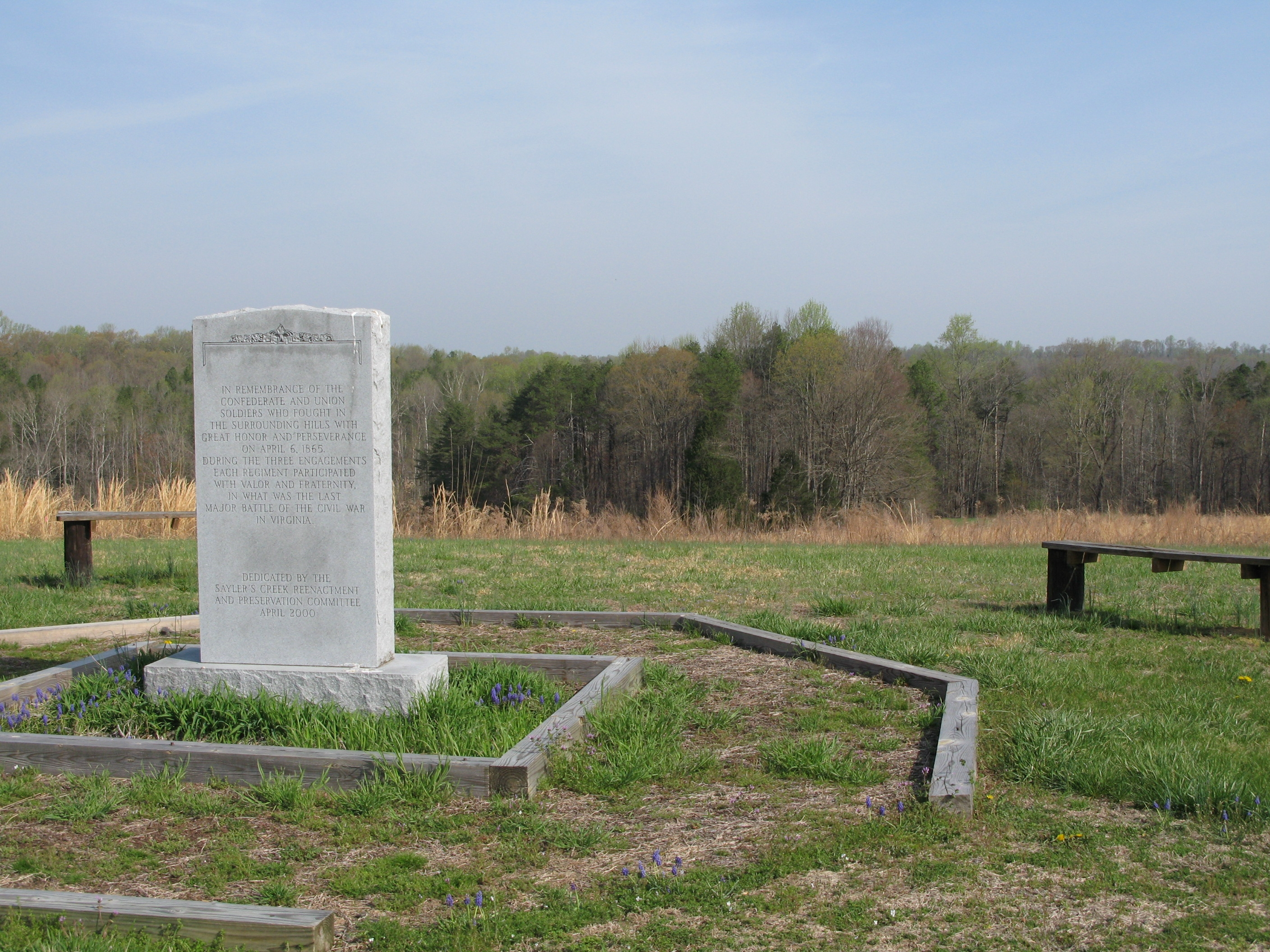 Monument on trail.